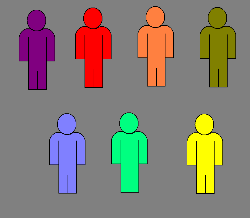 전에 그림처럼 그림판작